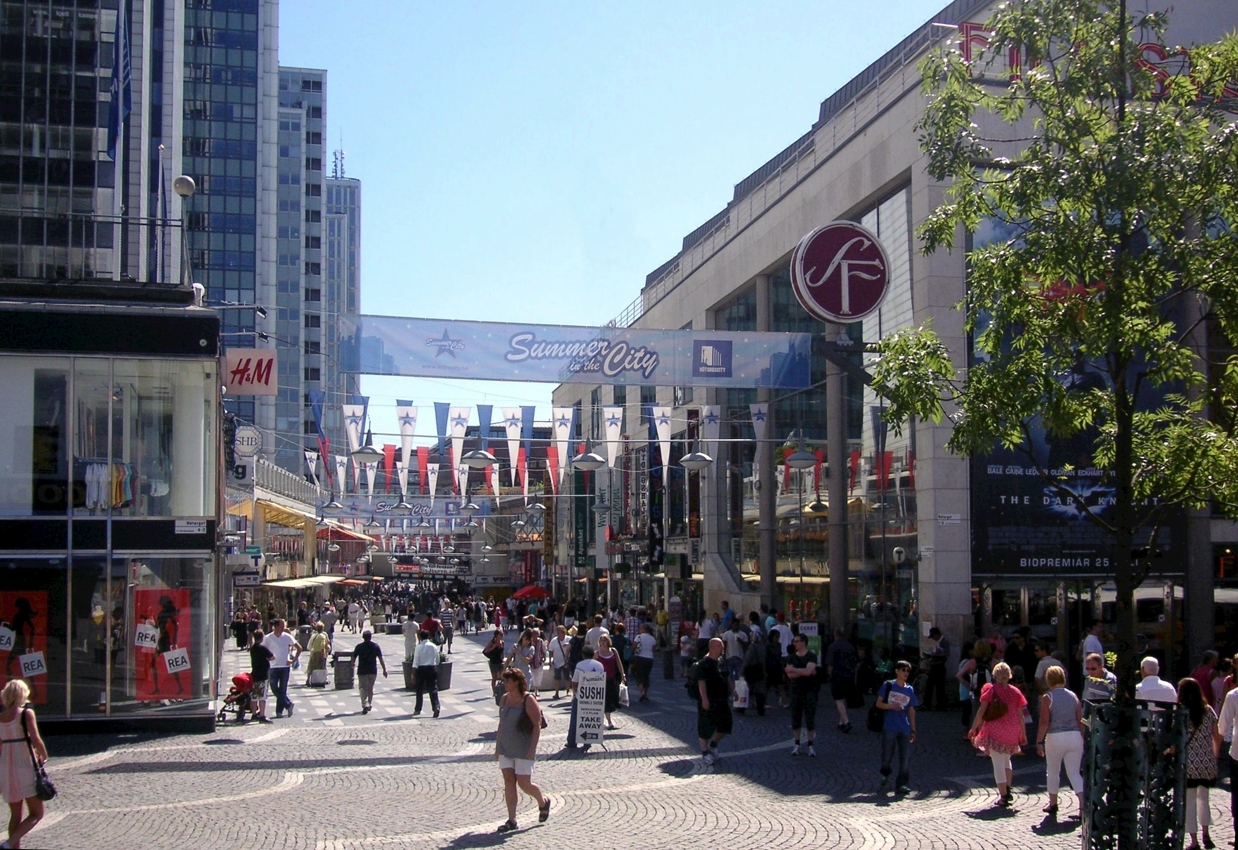 Hötorget och Sergelgatan i Stockholm, till höger syns "Framtidsträdet", asken som planterades 1986 av "Globträdet"